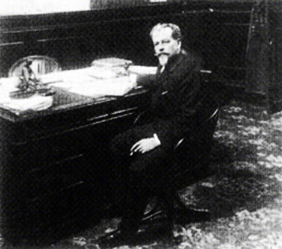 Pierola en despacho Presidencial